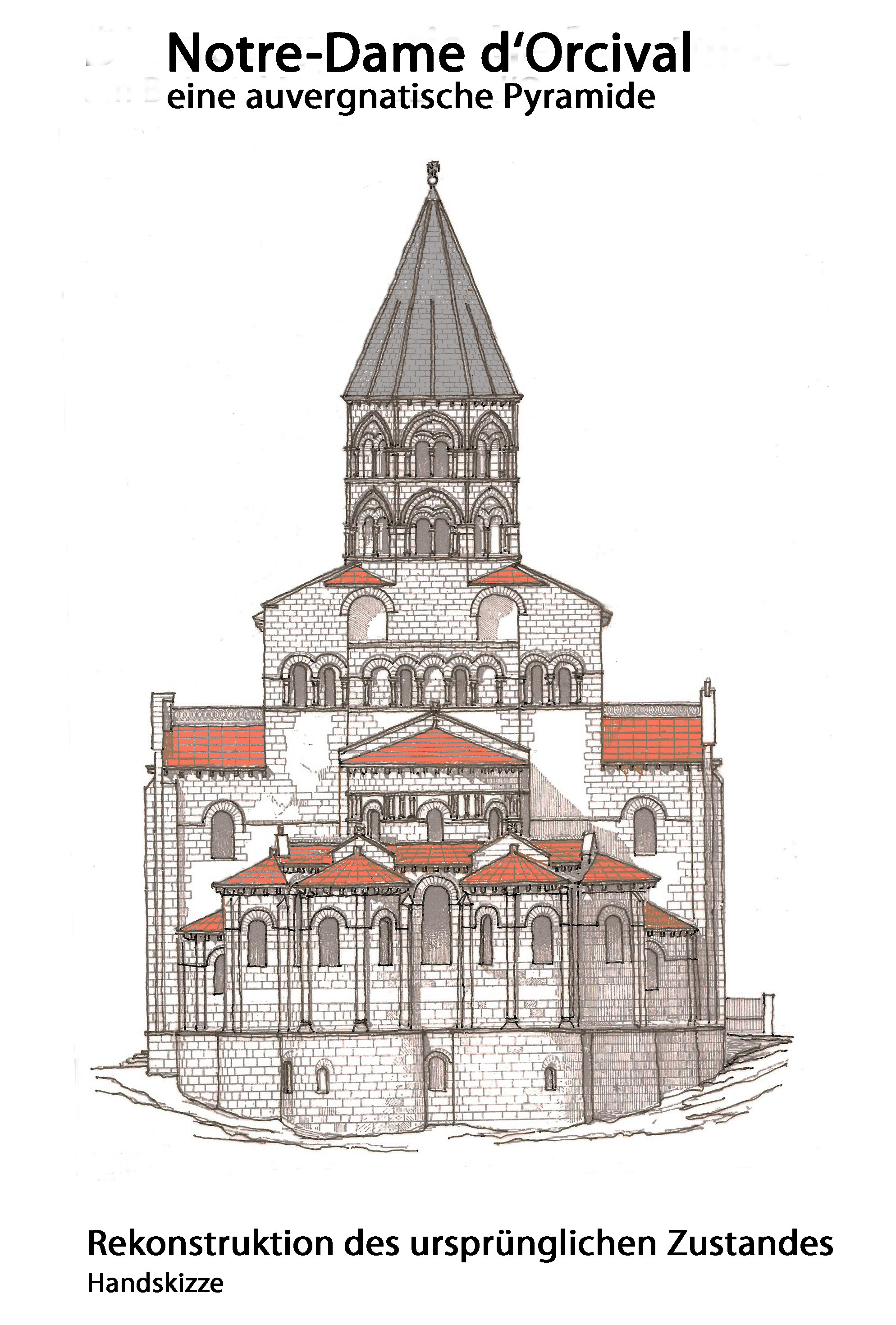 N.-D. d'Orcival,Auvergnatische Pyramide